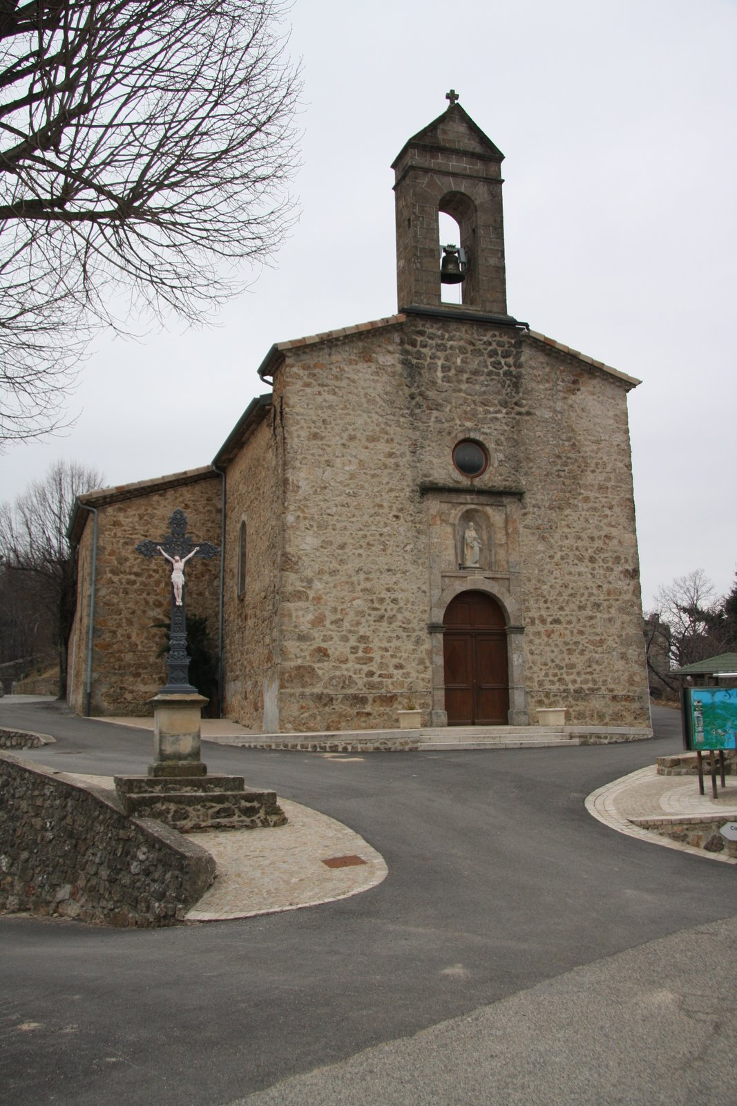 Façade de l'eglise de Saint-Joseph des Bancs